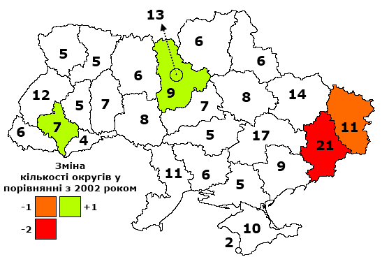 Зміна кількості одномандатних округів на виборах 2012 року у порівнянні з 2002.